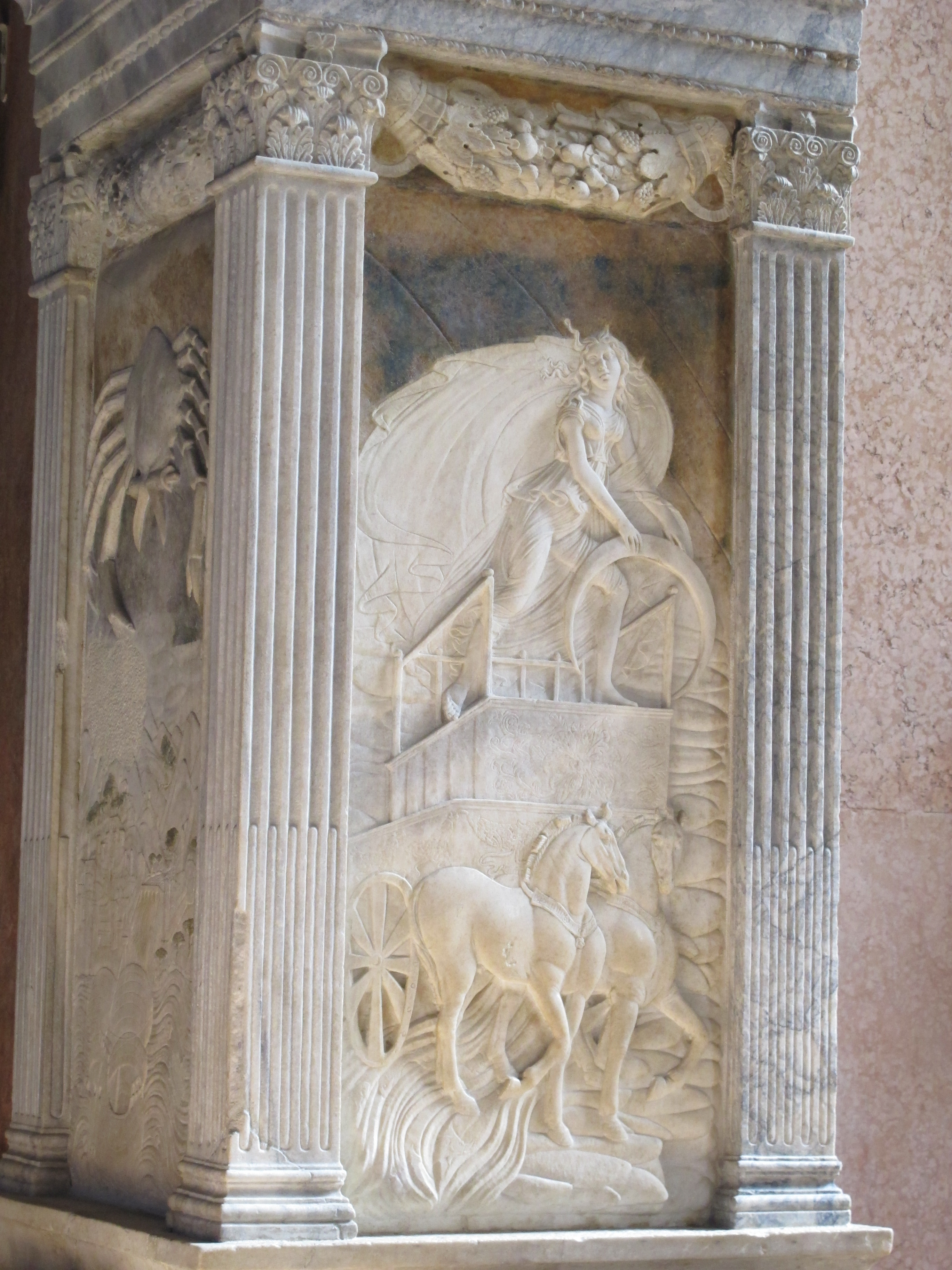 Tempio Malatestiano - MIBAC This is a photo of a monument which is part of cultural heritage of Italy.